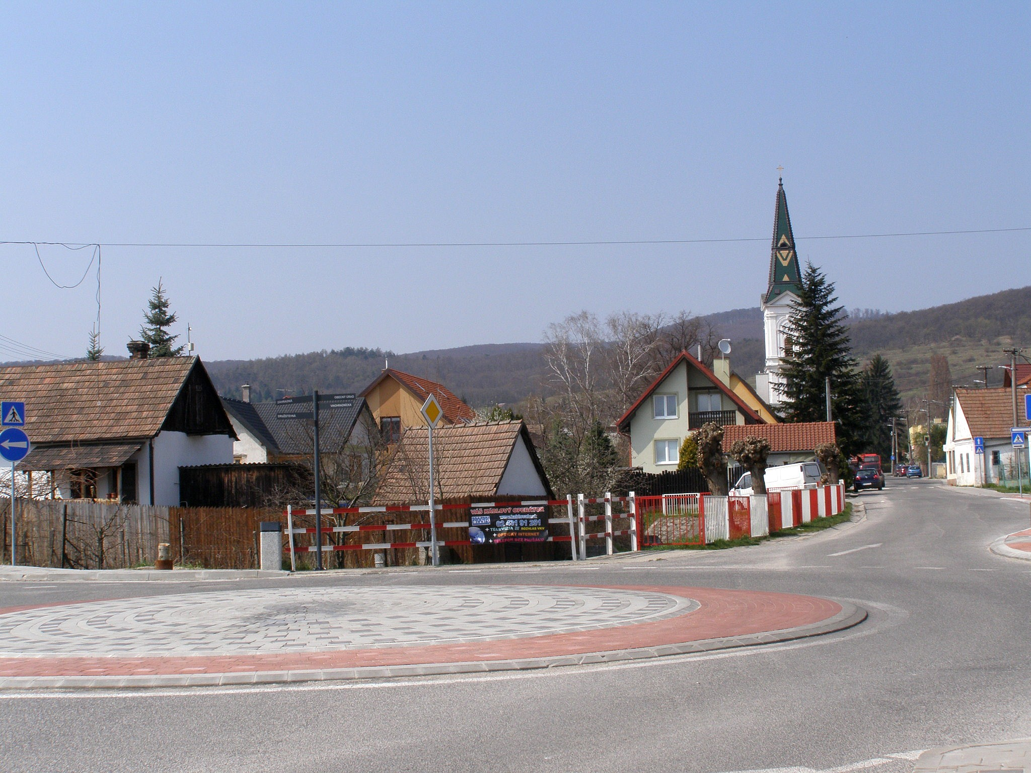 Pohľad na centrum obce Limbach; v pozadí evanjelický kostol